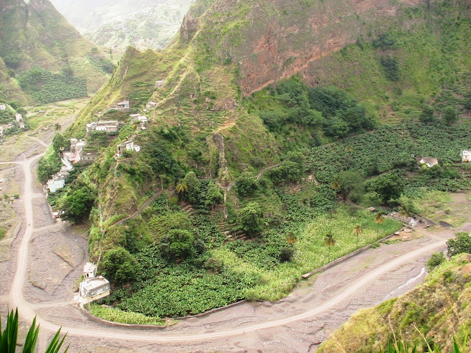 Ribeira da Torre, Santo Antão, Cabo Verde